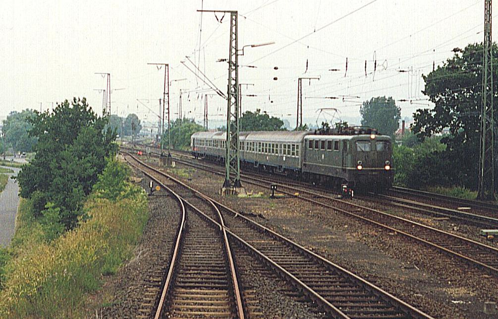 Situation in der südlichen Bahnhofseinfahrt von Lollar; ein typischer Nahverkehrszug, bespannt einer Lok BR 141, ist auf dem Weg nach Gießen. Links unmittelbar davor das ehemalige Streckengleis nach Wetzlar. Ganz links sind die beiden Abstellgleise 19 und 20 zu sehen. Das Bild entstand über Gleis 20, in dem sich bis ca. 1970 die Kiesverladeanlage befand. Ganz rechts das Streckengleis der Main-Weser-Bahn für Züge in nördlicher Richtigung.